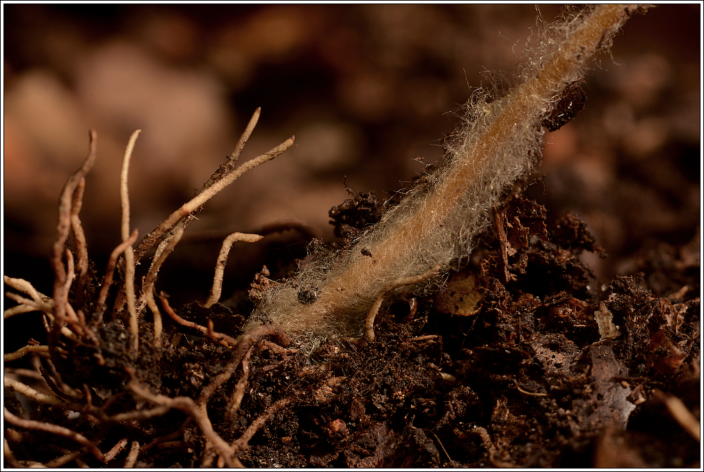 Houbové hyfy a jejich prorůstání ke kořenům rostliny. Vyfotografováno v lese nedaleko Mirkova u Ústí nad Labem.